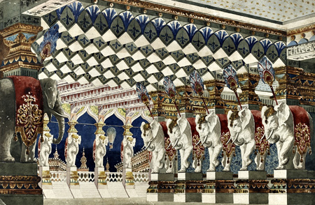 Projeto de cenário, aquarela/guache sobre papel, 20,7 x 32 cm.